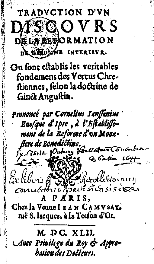 "Traduction d'un discours..." de Jansenius